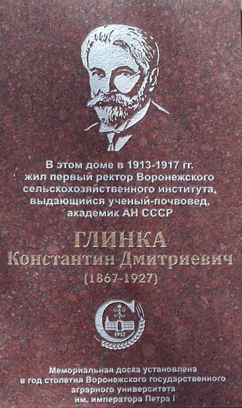 Мемориальная доска на доме 12 ул. Алексеевского, г. Воронеж